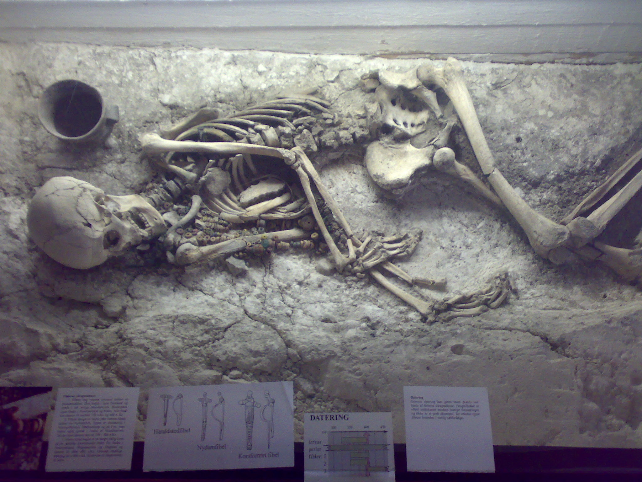 Iron Age female grave Aalborg, c 400 BC